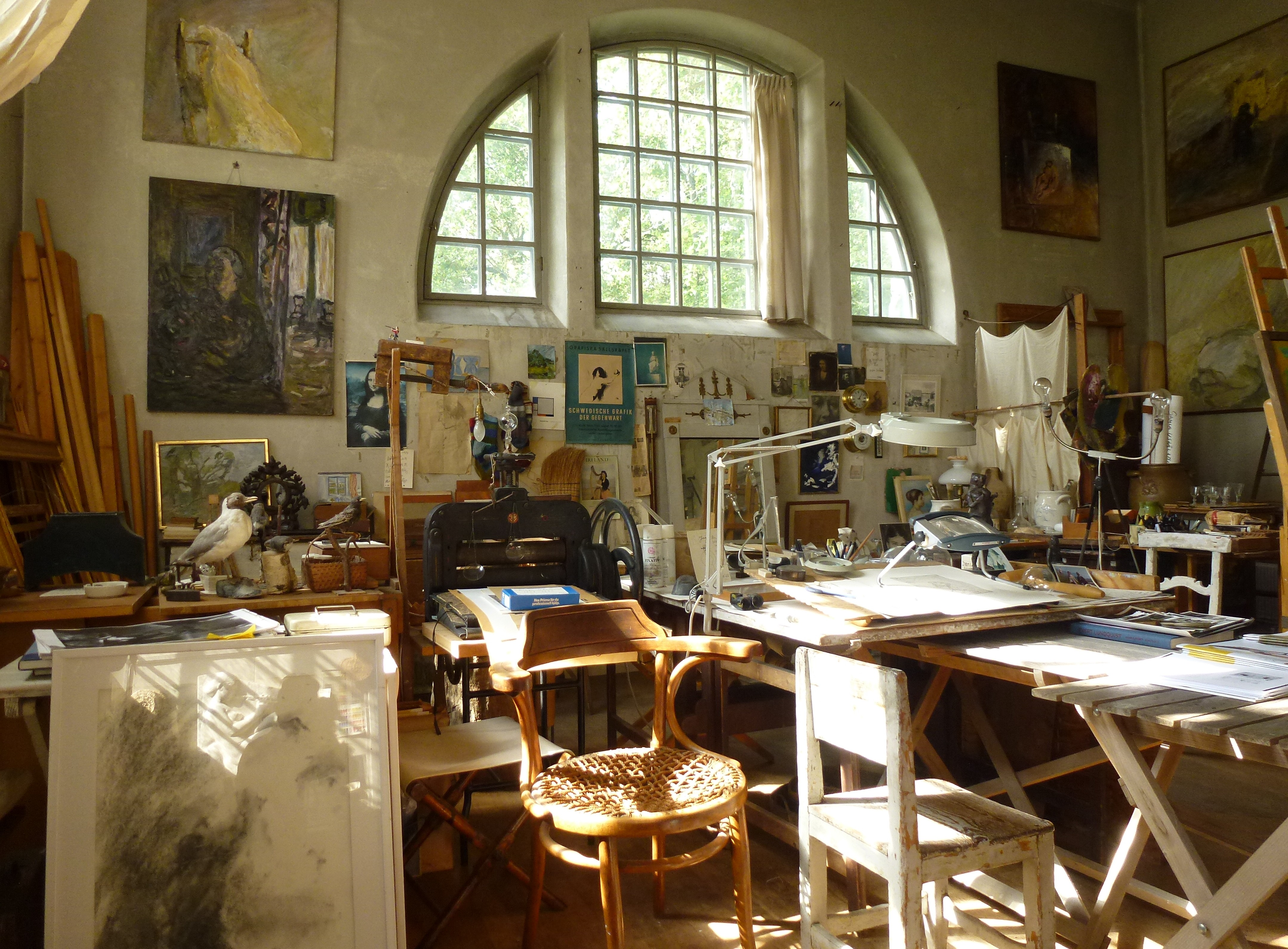 Evert Lundquists ateljé 2012